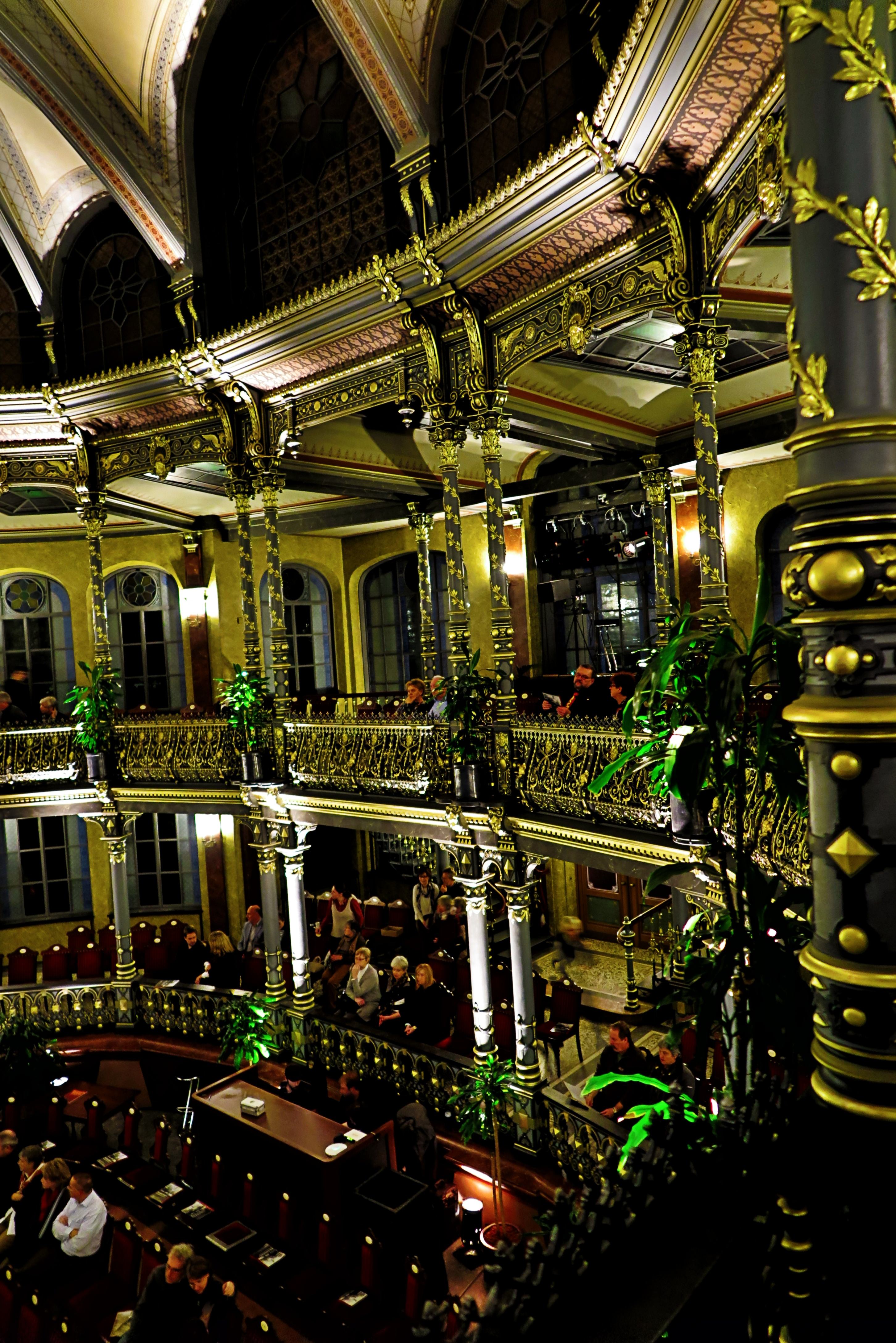 Deutschland, Bayern, Augsburg, Parktheater im Kurhaus Göggingen, rückwärtiger Zuschauerraum